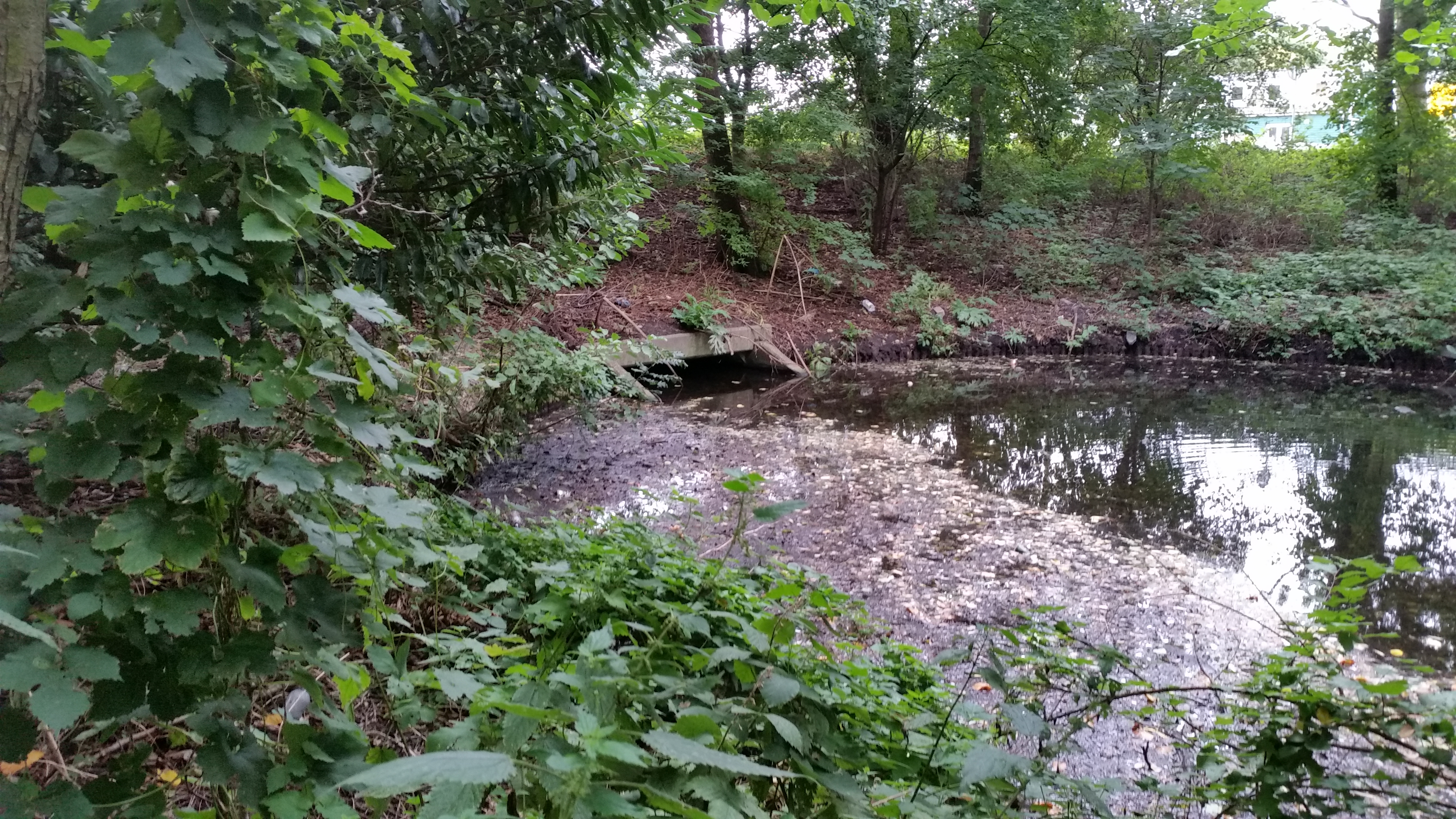 Ongenummerde duiker nabij brug 893, Amsterdam-Noord